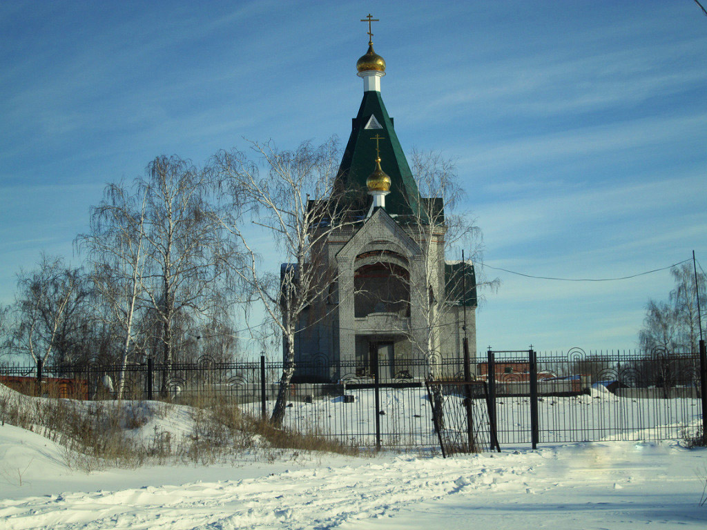 Строящийся Храм Святого праведного воина Федора Ушакова